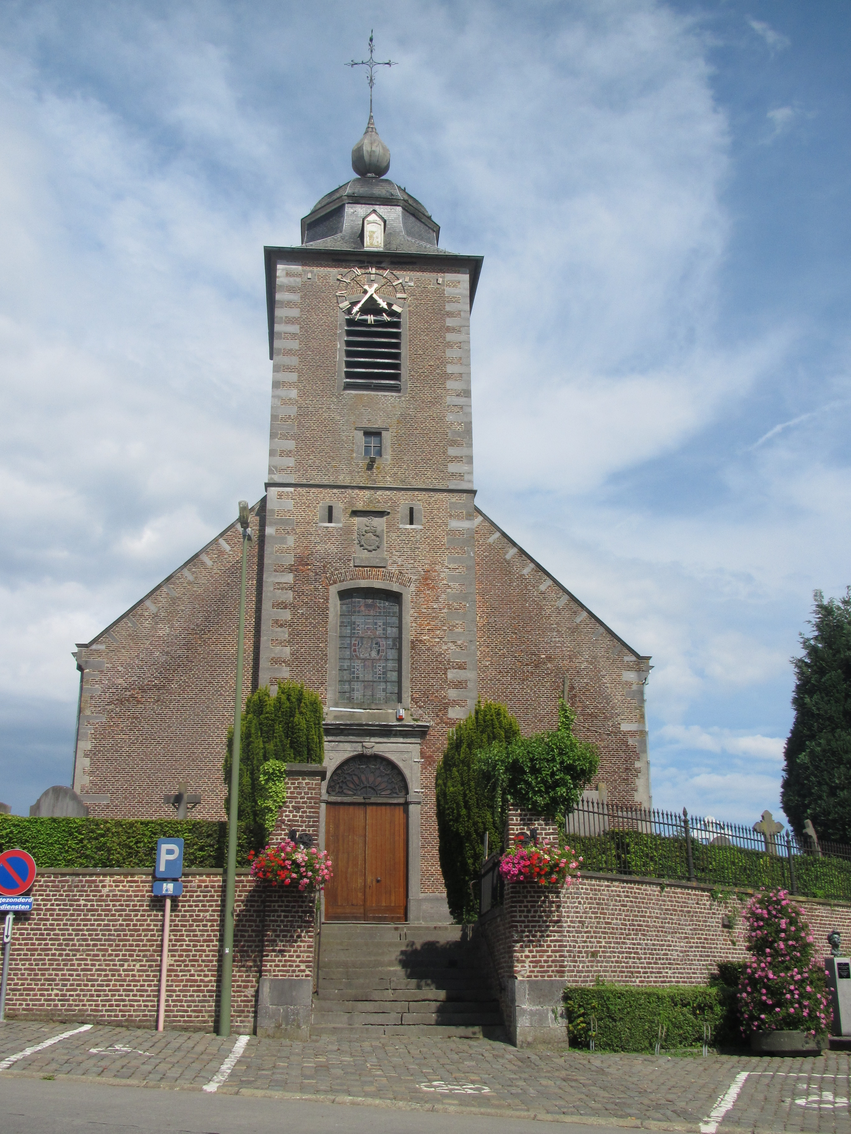 Sint-Pauluskerk van de Sint-Paulusparochie Vollezele